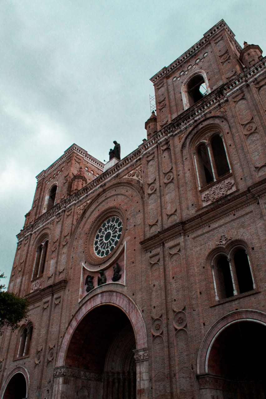 Vista frontal de la Catedral de la Inmaculada.